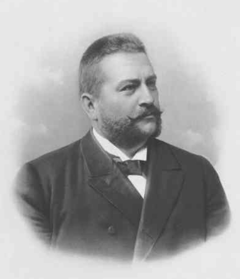 Josef Karl Strobach (1852 - 1905), Rakouský politik německé národnosti původem z Čech.